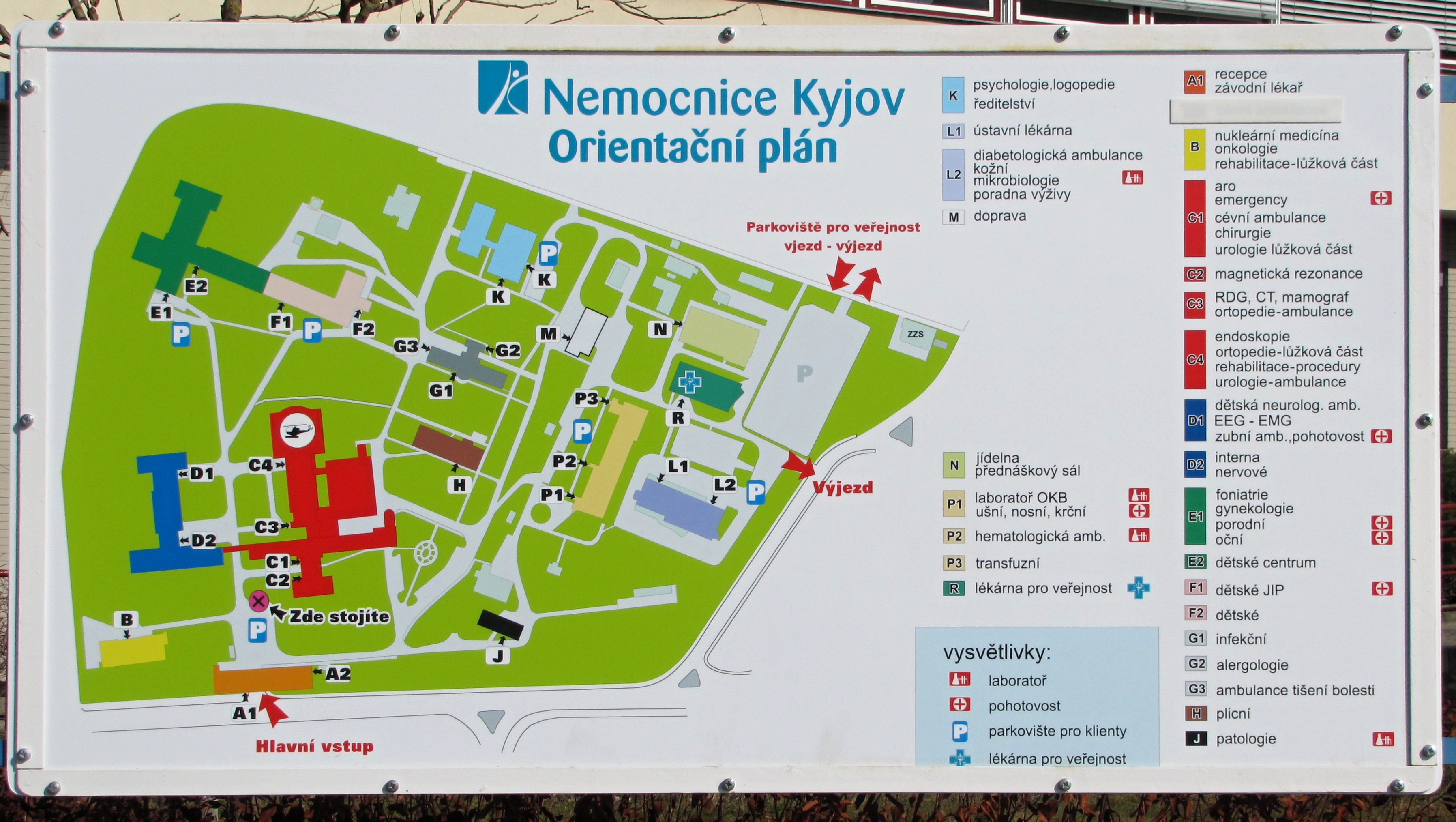 Nemocnice Kyjov, orientační plán